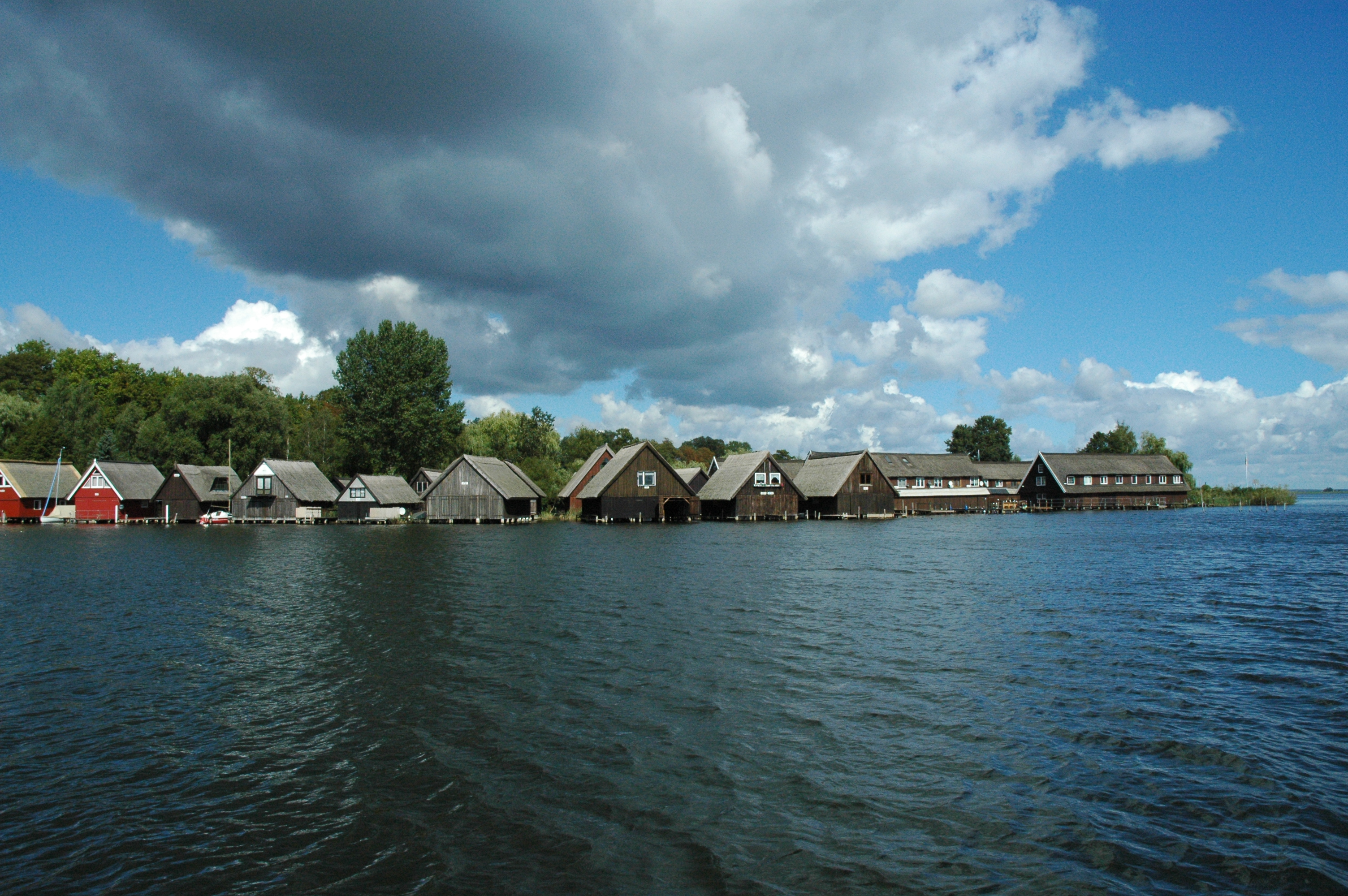 Bootshäuser im Müritzarm "Binnensee" vor Röbel